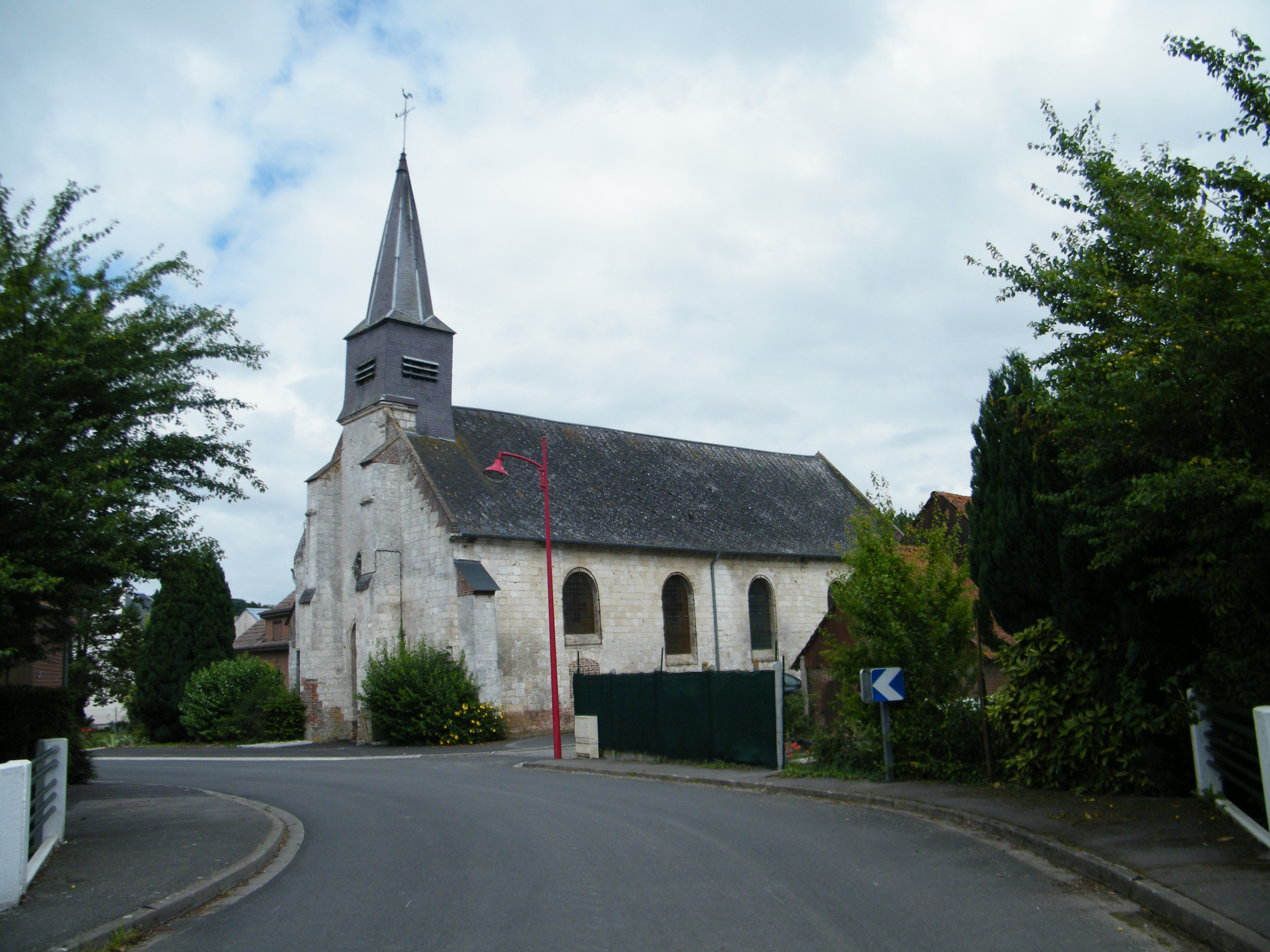 L'église Saint-Fursy de Mézerolles, Somme, France.